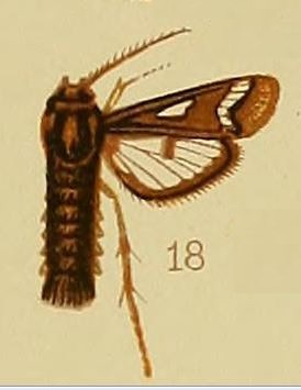 Thyranthrene obliquizona